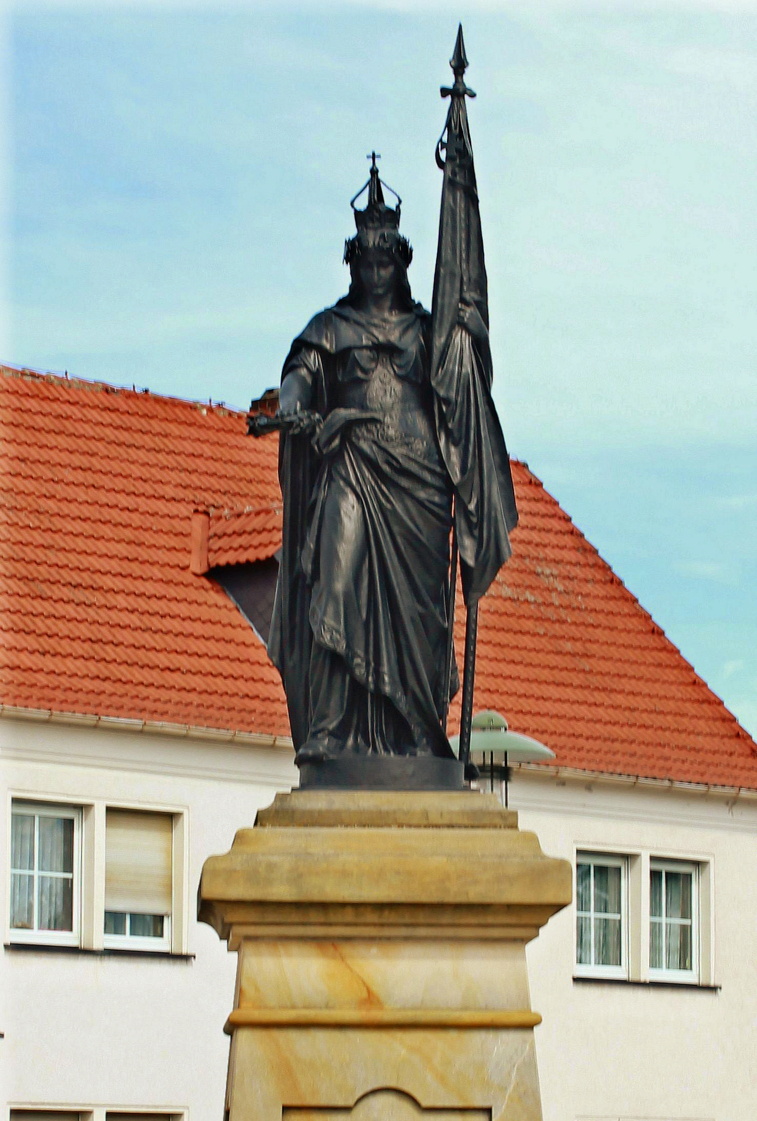 Germania-Denkmal in Lauchhammer-Mitte. Es handelt sich um einen Nachguss aus dem Jahr 1996. Das aus dem Jahr 1896 stammende Original war 1946 zerstört worden.